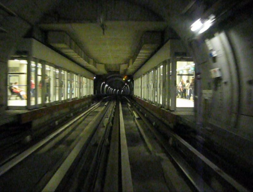 Tunnel du métro de Rennes à la station République, direction La Poterie